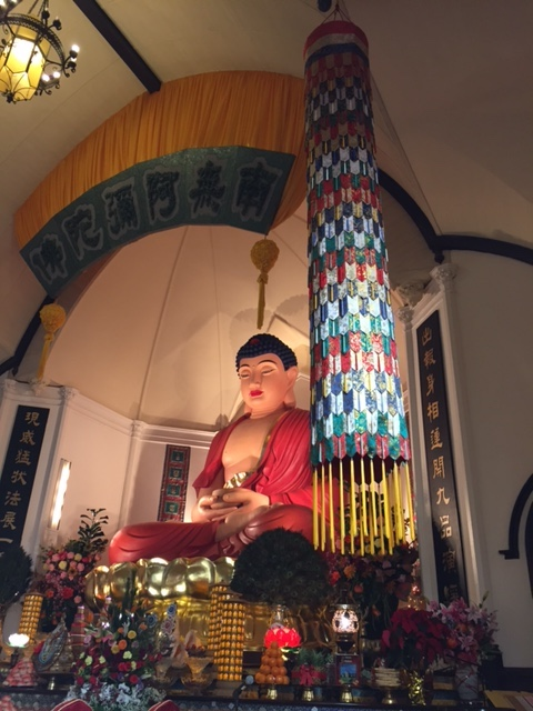 華藏寺阿彌陀佛法像